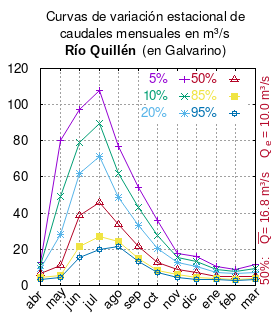 Curva de Variación Estacional Río Quillén en Galvarino. # cita publicación # | apellido = Dirección General de Aguas # | nombre = # | enlace-autor = Ministerio de Obras Públicas (Chile) # | título = Diagnóstico y clasificación de los cursos y cuerpos de agua según objetivos de calidad. Cuenca del río Imperial # | ubicación = Santiago de Chile # | editorial = Ministerio de Obras Públicas (Chile) # | año = 2004 # | edición = # | url = # | ref = harv # pág. 50 mes 5% 10% 20% 50% 85% 95% abr 12.601 10.967 9.263 6.689 4.403 3.366 may 80.199 49.164 27.944 11.067 5.502 4.556 jun 97.152 79.312 62.032 38.783 21.747 15.482 jul 107.738 89.337 71.209 46.143 27.043 19.762 ago 76.689 61.914 48.824 33.471 24.313 21.536 sep 54.375 43.073 33.179 21.785 15.174 13.222 oct 35.89 27.657 20.612 12.774 8.459 7.246 nov 17.868 15.346 12.762 8.972 5.814 4.505 dic 15.98 13.337 10.713 7.048 4.208 3.109 ene 10.63 8.706 6.987 4.945 3.705 3.322 feb 9.009 7.921 6.787 5.074 3.552 2.862 mar 11.431 9.235 7.314 5.102 3.821 3.443